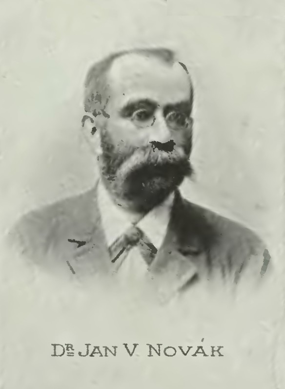 Portrét – Jan Václav Novák (1853-1920), Český literární historik.